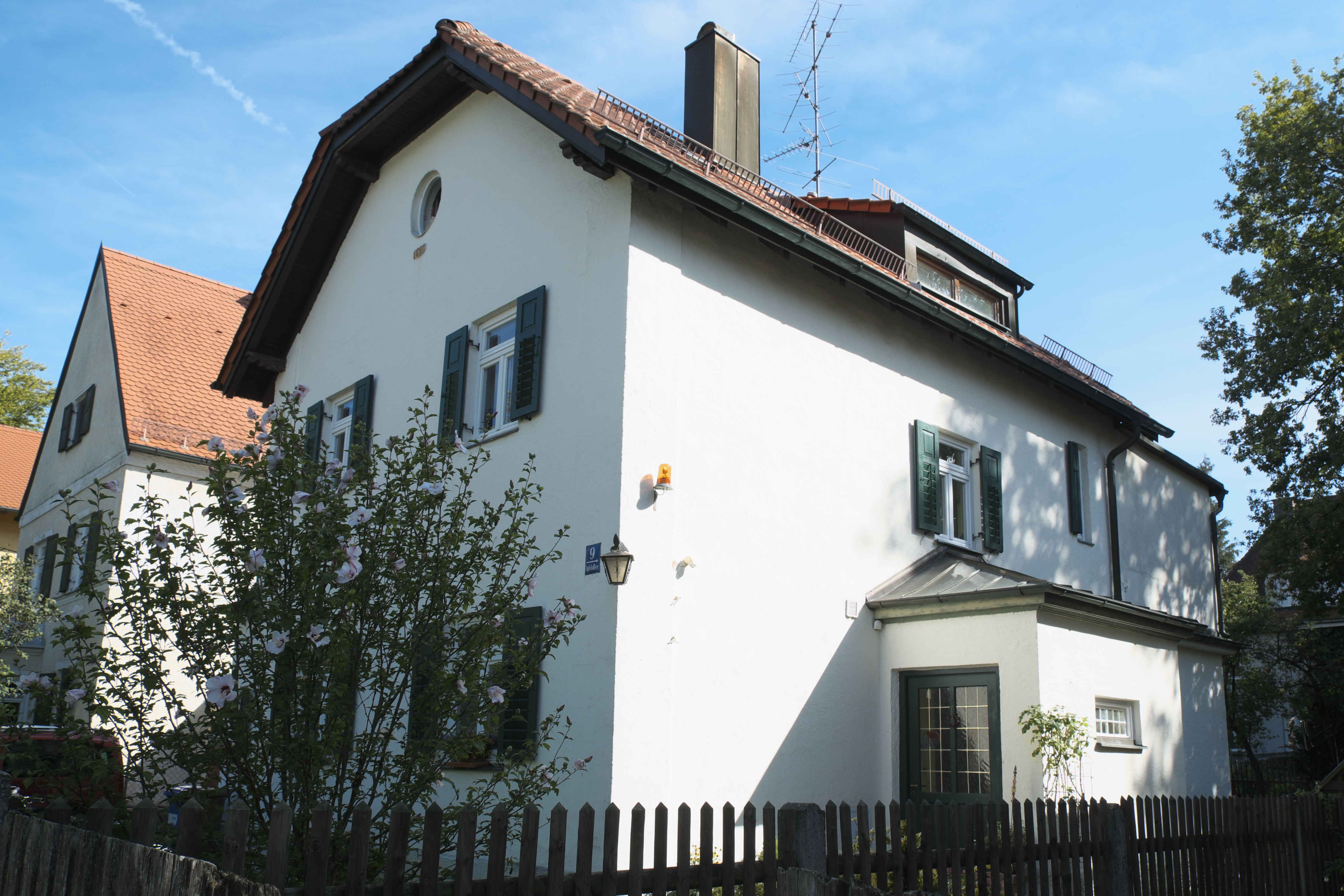 Wohnhaus, Apfelallee 9, in Obermenzing im Stadtbezirk Pasing-Obermenzing in München (Bayern/Deutschland), mit der Jahreszahl 1898, aus dem Büro August Exter